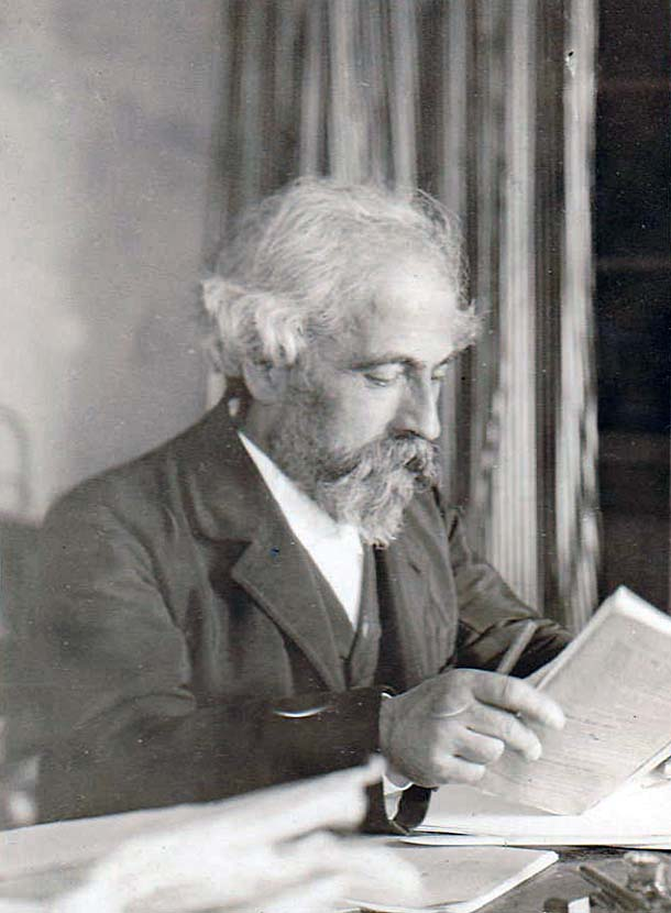 Le théologien protestant Paul Sabatier en 1905. Archive familiale numérisée.